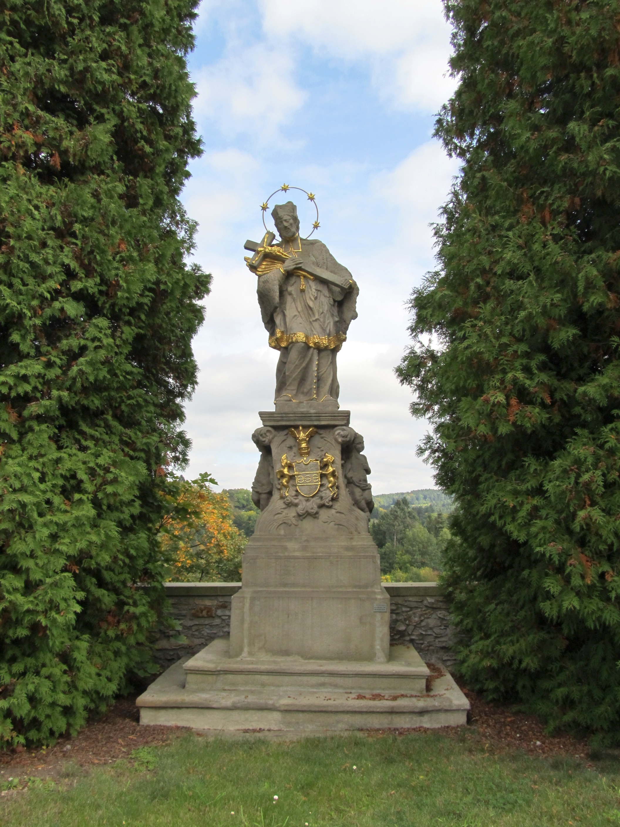 Socha sv. Jana Nepomuckého (Nové Město nad Metují), U Zázvorky, Nové Město nad Metují